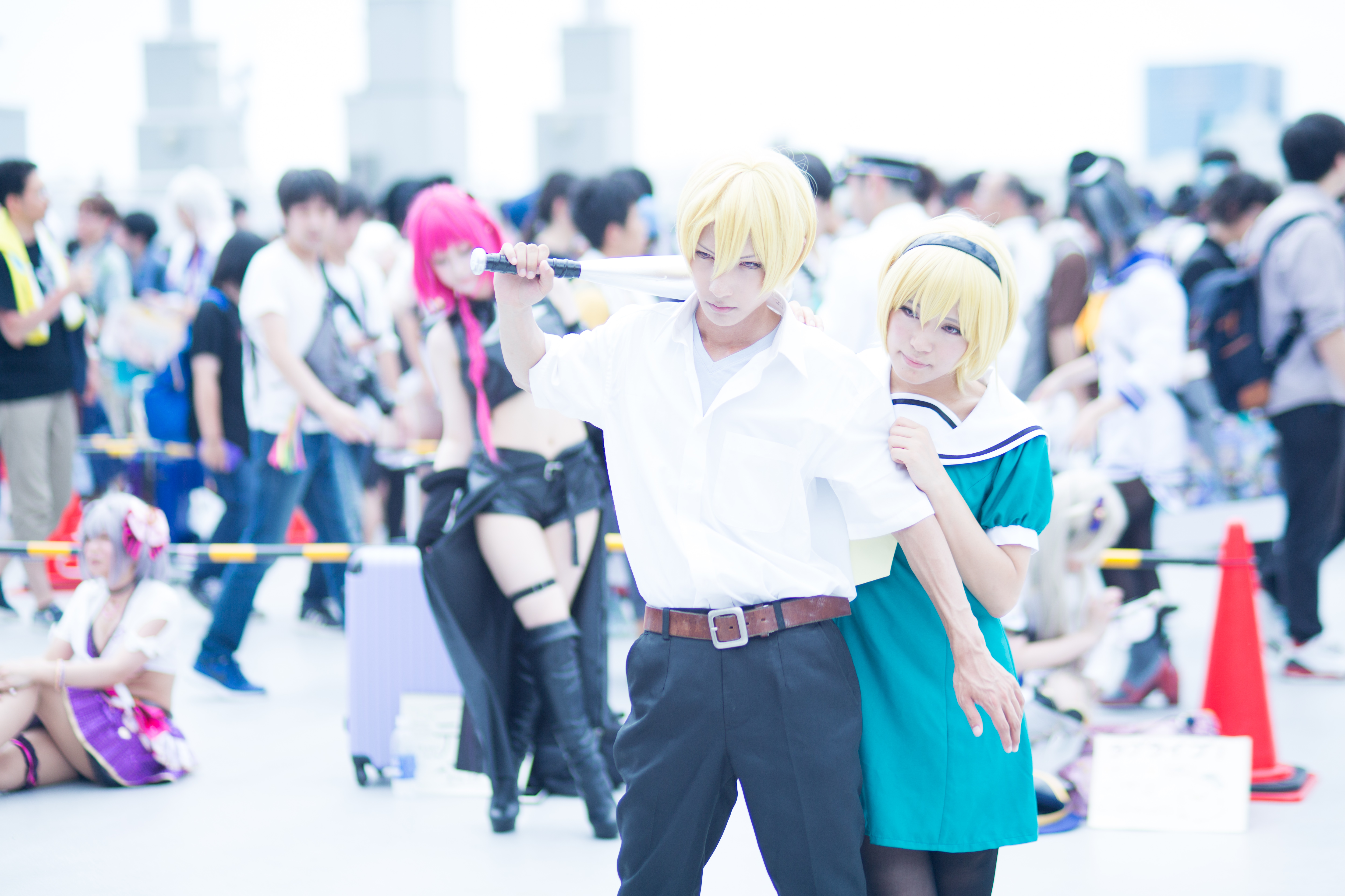 コミックマーケット92 3日目 コスプレイヤー